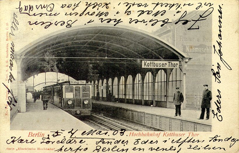 U-Bahnhof Kottbusser Tor und in Berlin-Kreuzberg. Befördert am 4. Mai 1903.